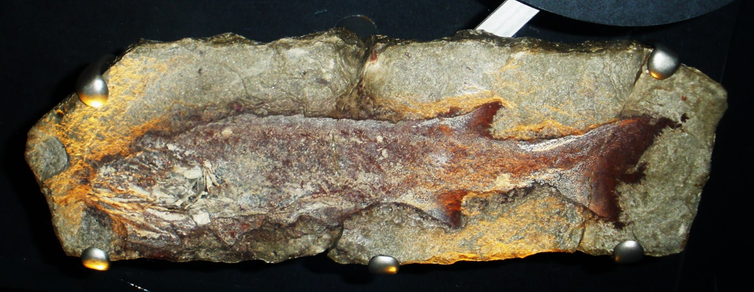 Fossil of Cheirolepis, an extinct fish-- Took the photo at Natural History Museum, London